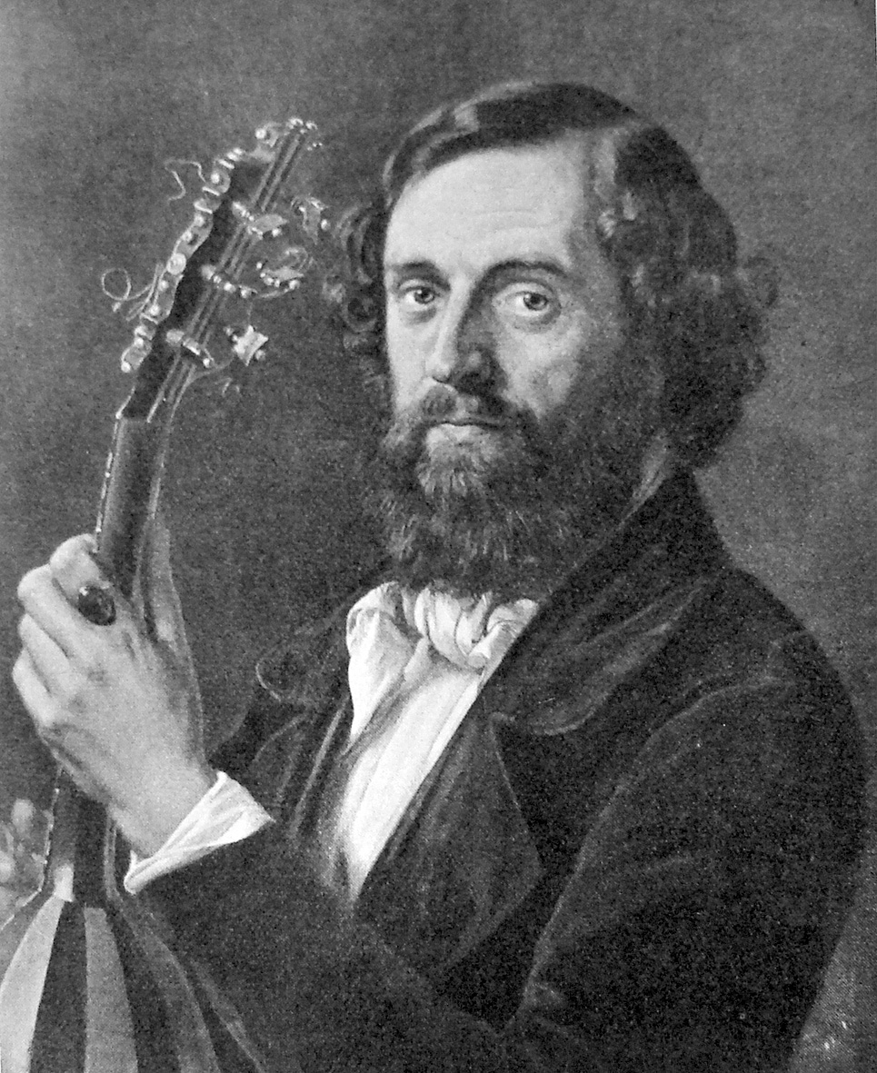 Henrik Rung (31. marts 1807 - 12. december 1871) var en dansk komponist, sangpædagog og dirigent.